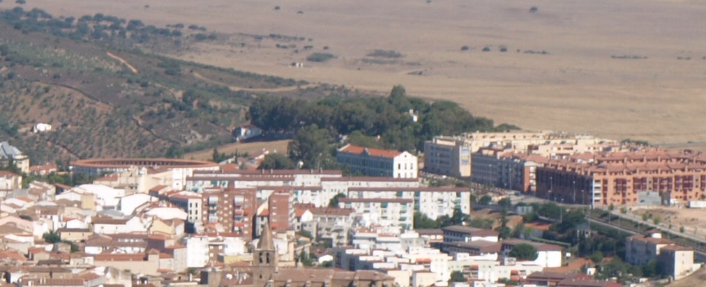 Paseo Alto, el parque más antiguo de Cáceres, España. Junto al paseo se ven los barrios de Infanta Isabel y San Justo. Vista desde La Montaña.